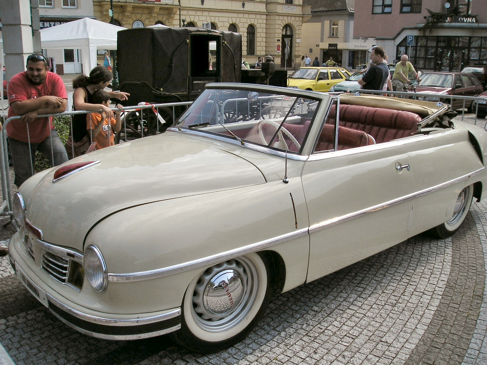 Tatra 600 Kabriolet Sodomka (front)